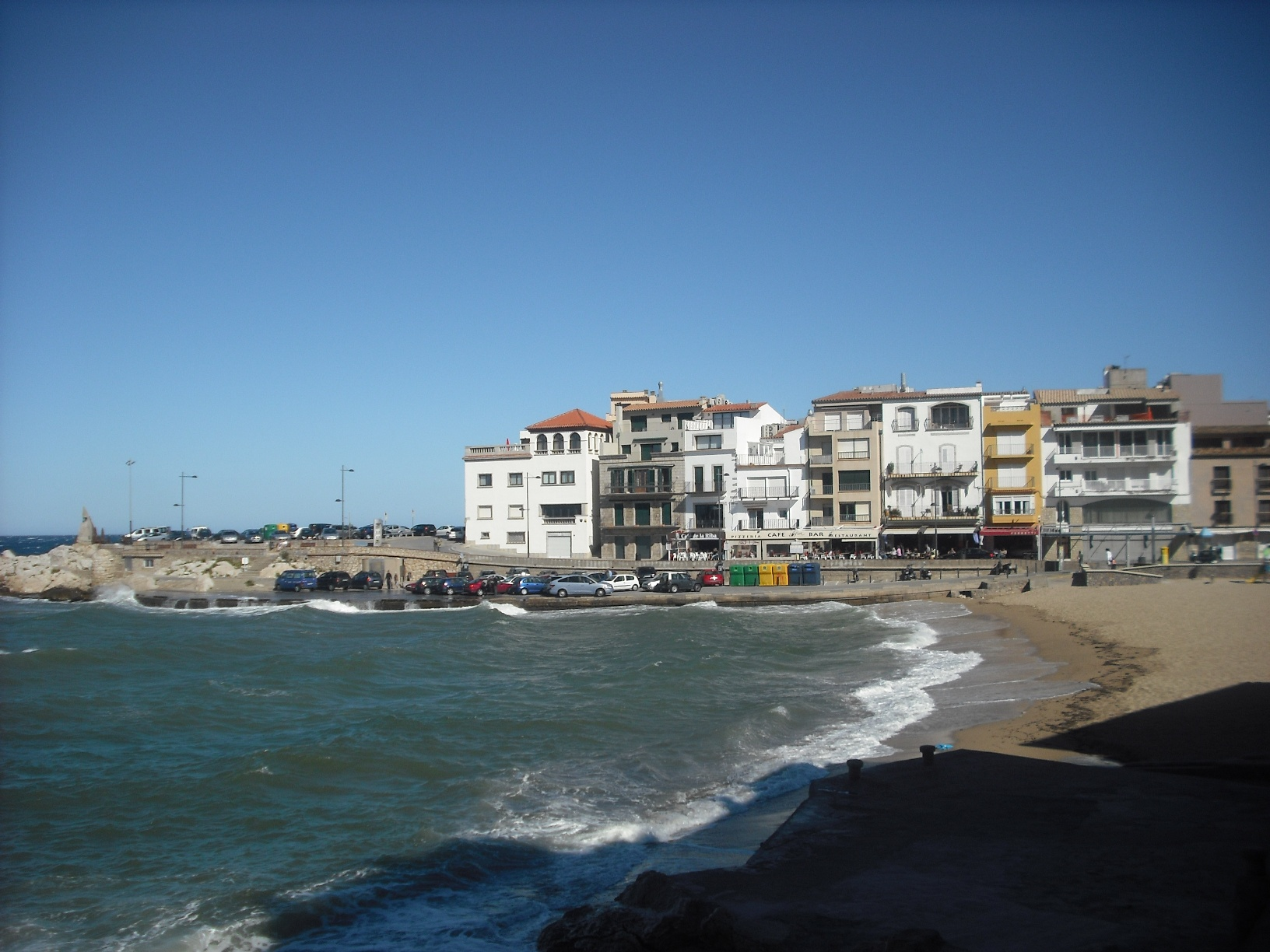 Platja de l'Escala.